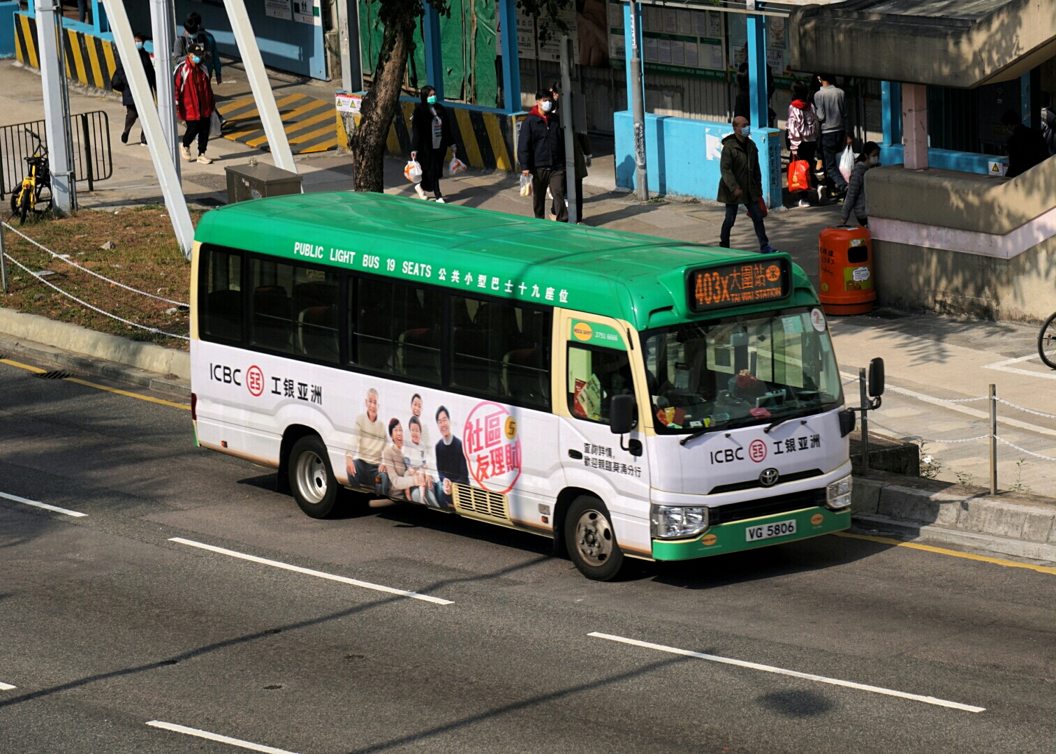 中文（香港）: 新界區專線小巴403X線，正途經大圍站外迴旋處